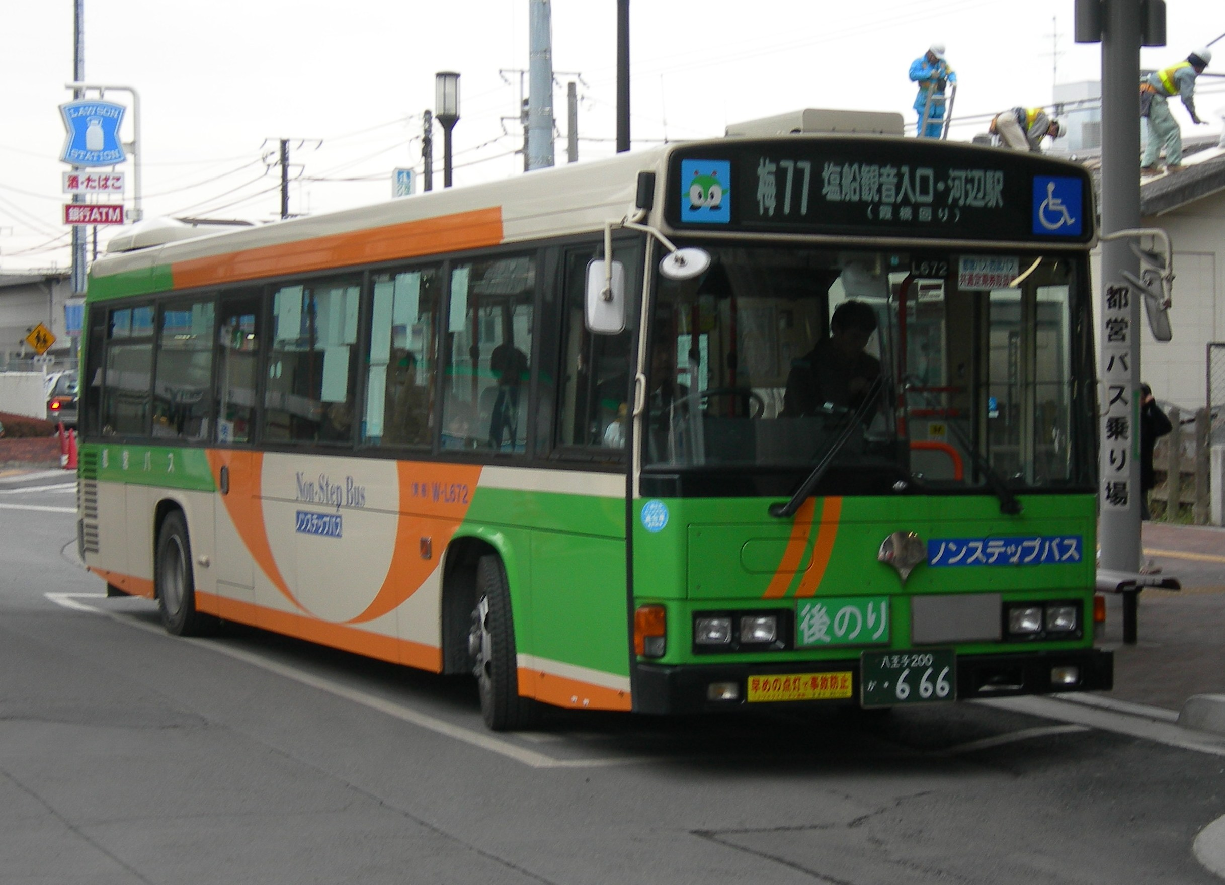 都営バス梅77系統